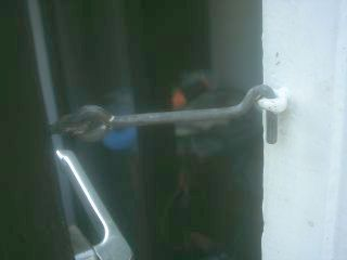 Een haak en een oog om de deur op een kier te houden